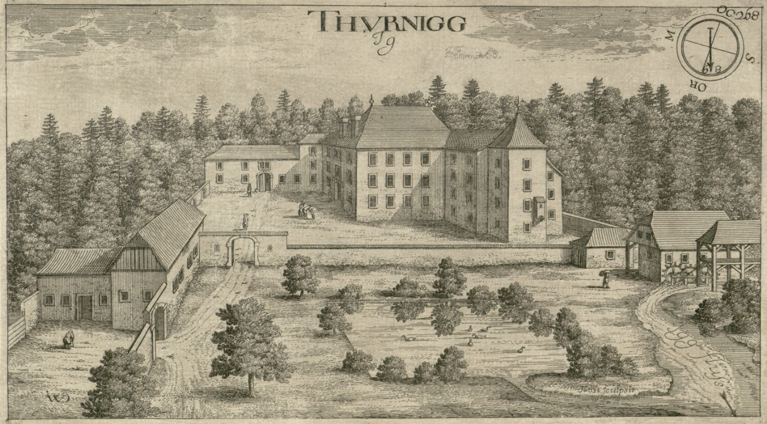 Grad Ig